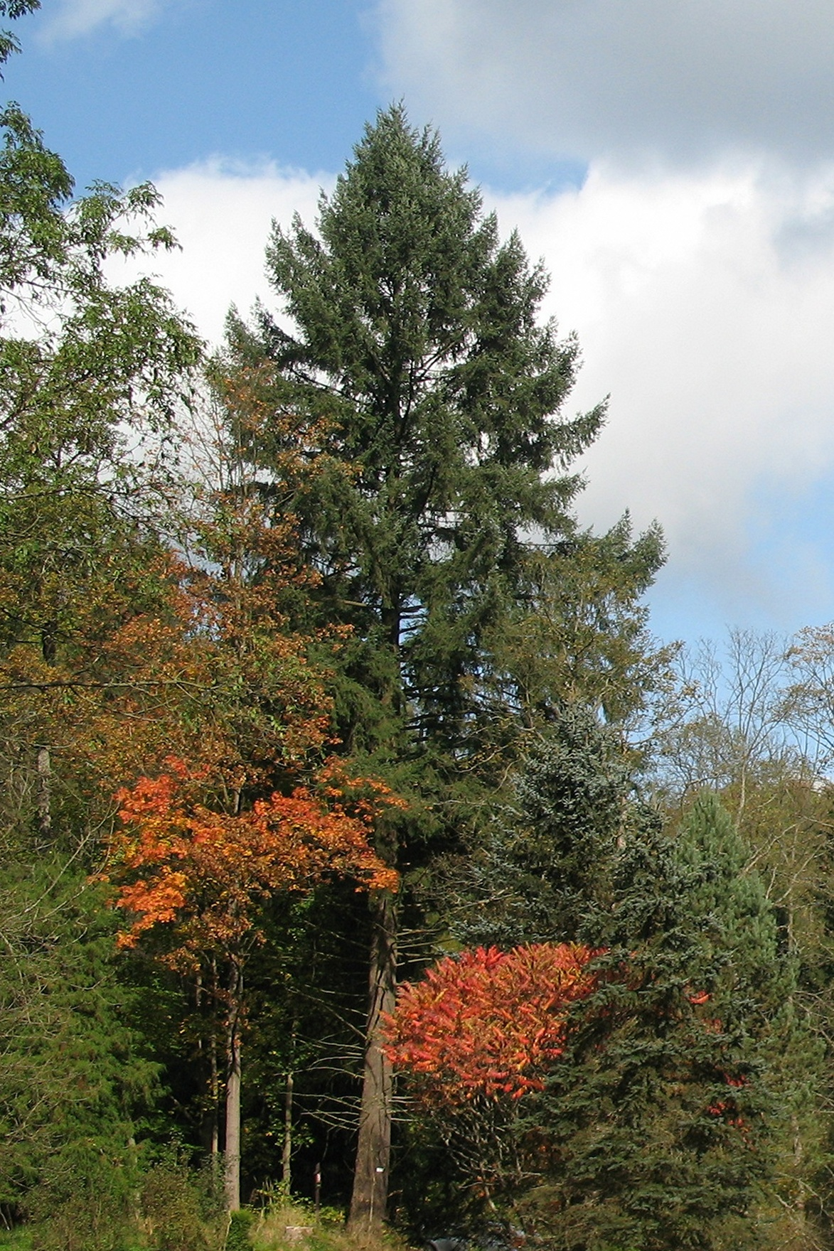 Památný strom Wäberova douglaska v Kopci